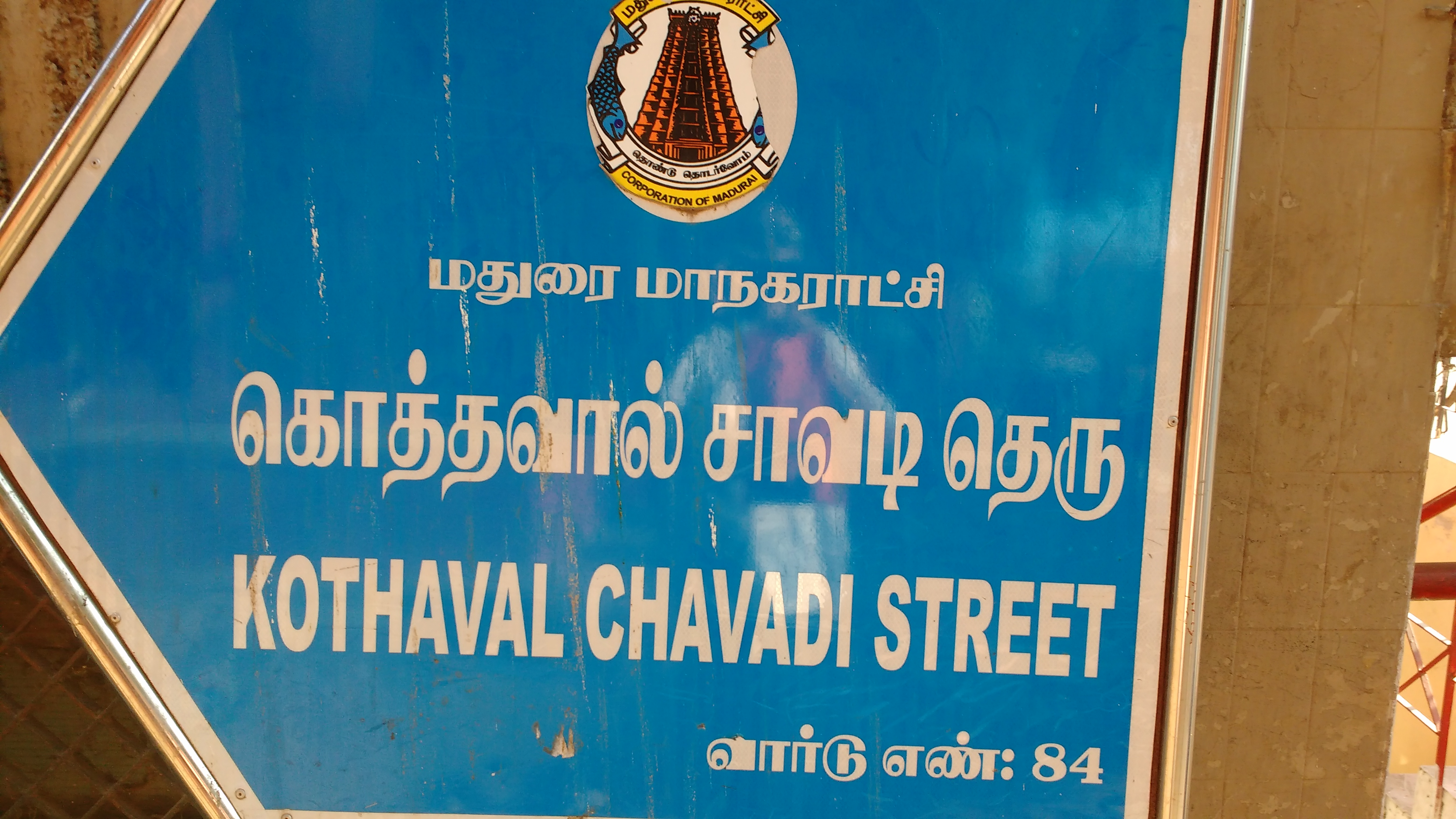 கொத்தவால் சாவடி தெரு, மதுரை